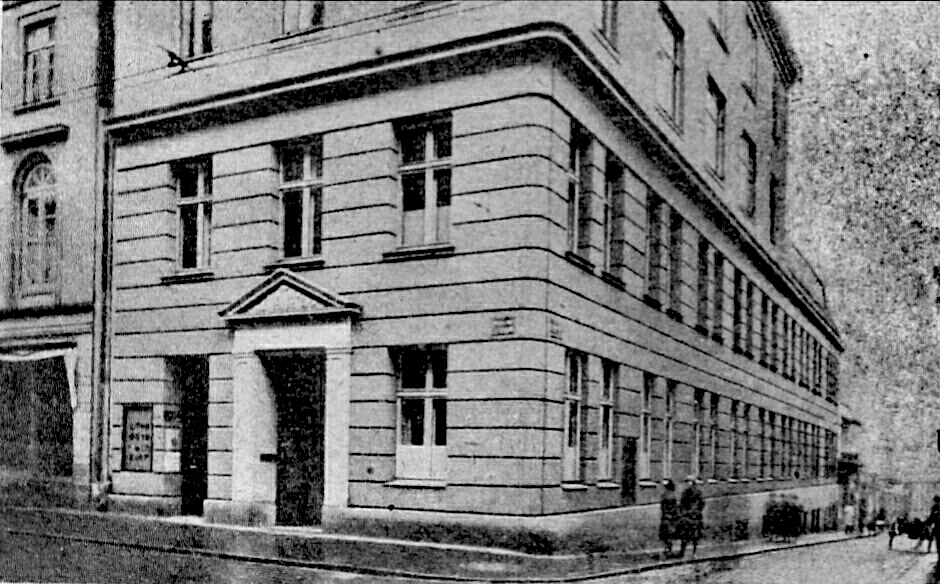 Fassade und Innenraum des neuen Gebäudes, Ecke Breite Straße und Hüxstraße, in das jetzt die Nationalbank für Deutschland, Zweigniederlassung Lübeck ihren Geschäftsbetrieb verlegt hat. An Stelle der früheren Stätte des Metropol-Theaters ist ein ruhig wirkender Bau getreten. Zweckmäßig war auch die Einrichtung der Geschäftsräume, die vorläufig nur der Kellerräume und das Erdgeschoss einnahmen, gehalten. Nach deren Ausbau sollte später auch die erste Etage für den Bankbetrieb verwendet werden. Der Umbau wurde von den Berliner Architekten Zerbe und Harder geleitet, sämtliche Arbeiten waren jedoch lübeckischen Firmen übertragen worden. Ursprünglich waren die Räume für die Einrichtung einer Filiale der Darmstädter Bank vorgesehen; da die Banken jedoch indes eine Interessengemeinschaft gebildet hatten, aus ihnen sollte noch im selben Jahr die DANAT hervorgehen, konnten die Interessen beider Banken in Lübeck durch die Nationalbank für Deutschland vertreten werden.